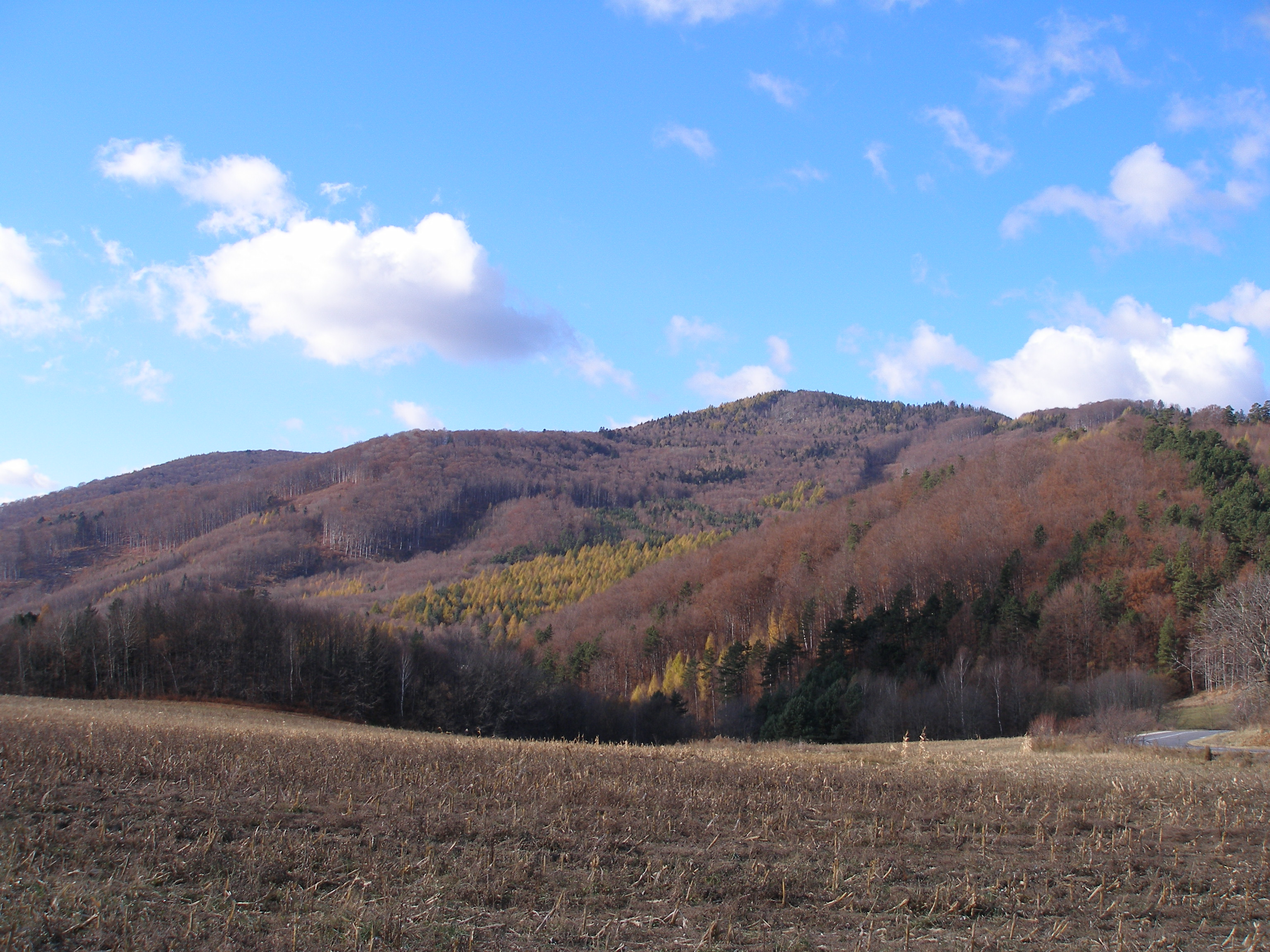 Najvyšší vrch Čiernej hory Roháčka